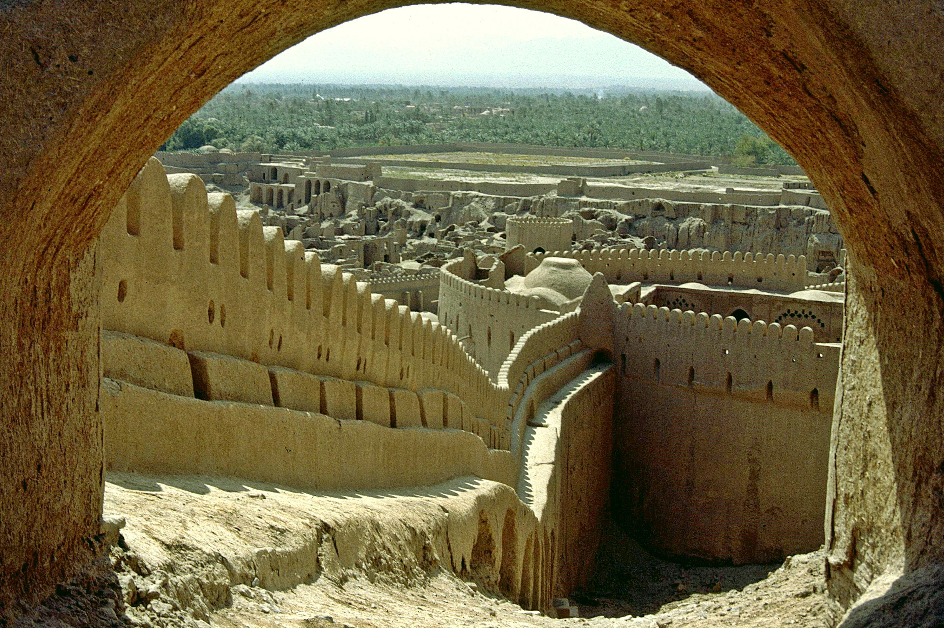 Zitadelle in der Oasenstadt Bam/Ostiran